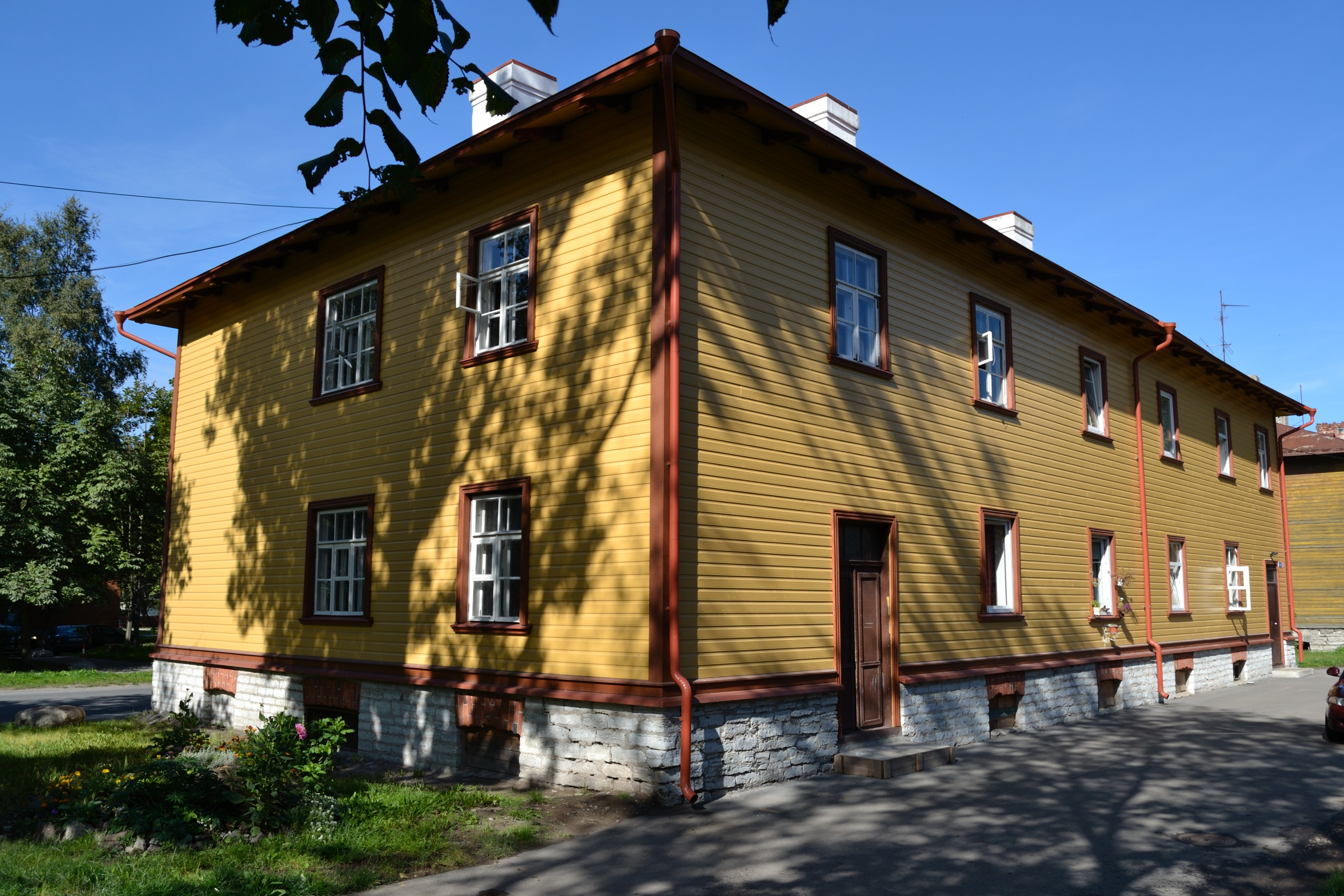 Tallinn, Balti Puuvillavabriku tööliselamu Sitsi 11, 1901-1905